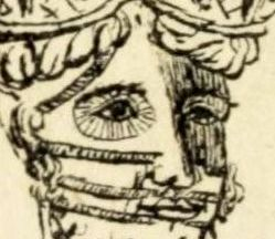 Joseph Kabris - Tatouage du Juge